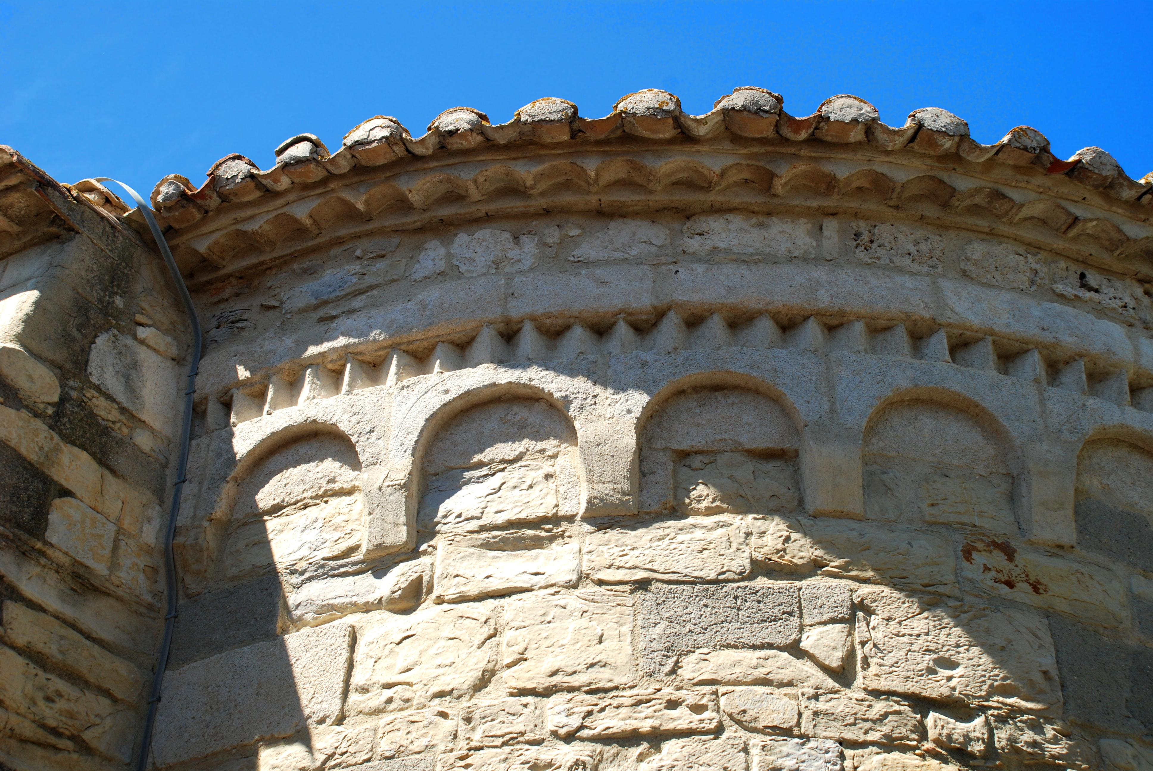 France - Hérault - Église de Saint-Hilaire-de-Beauvoir